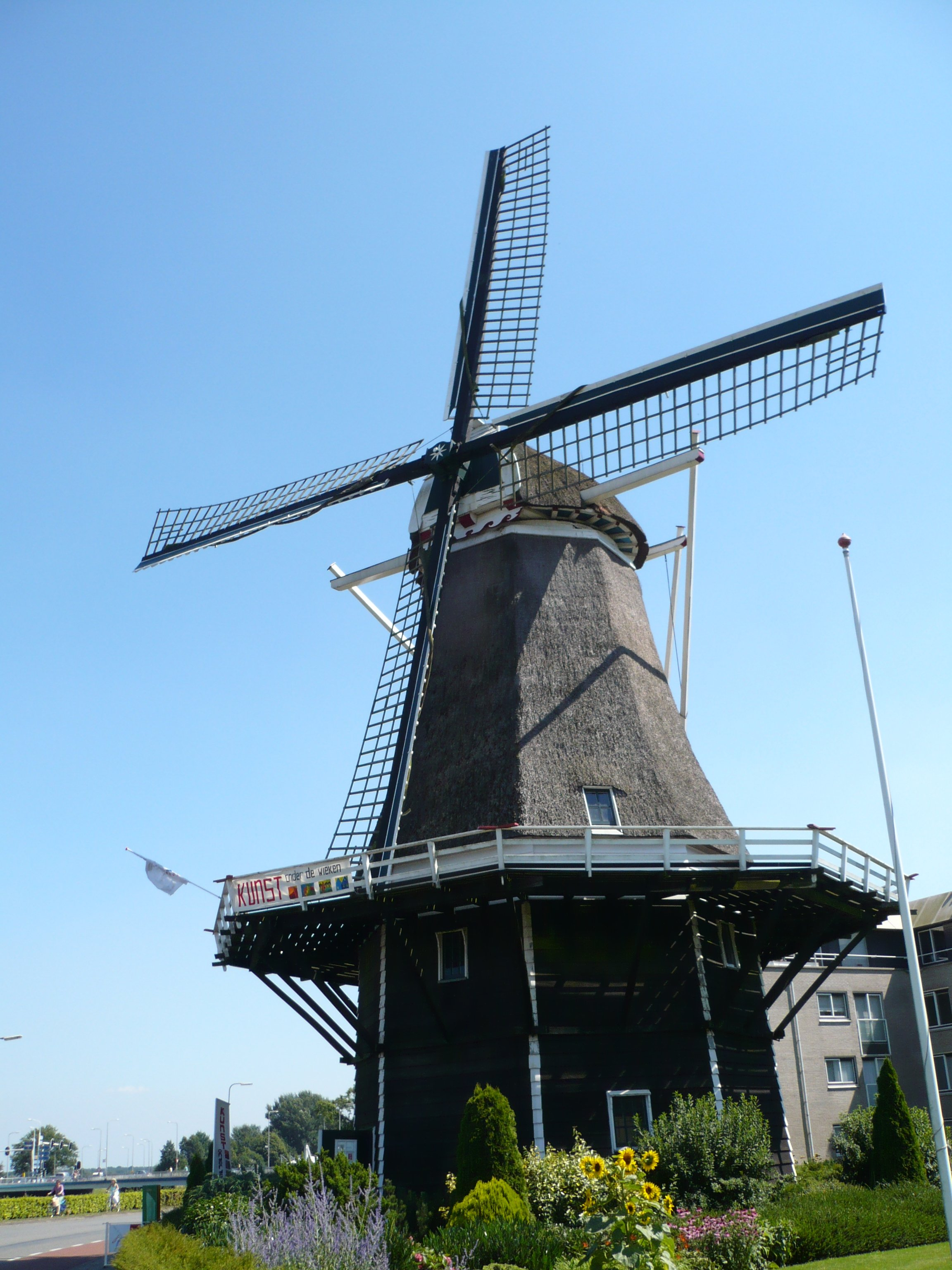 De Konijnenbelt